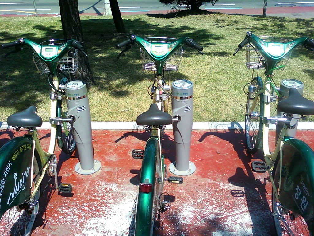 창원시 상남동 시민생활체육관 앞 누비자 자전거.